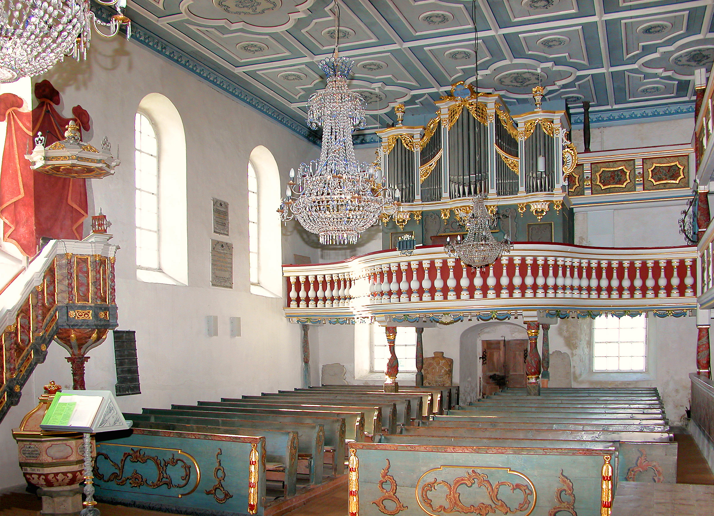 25.09.2006 09544 Cämmerswalde (Gemeinde Neuhausen/Erzgeb.): Dorfkirche (GMP: 50.709103,13.502754) romanischen Ursprungs aus dem 1. Viertel des 15 Jh., Umbau von 1703-1708 brachte barocke Ausstattung. Die Holzdecke stammt aber noch aus dem 17. Jh., ebenso Altar und Kanzel. Orgel von Adam Gottfried Oehme 1763. Oehme war seit 1737 ein Schüler in der weltberühmten Orgelwerkstatt von Gottfried Silbermann. Nach dessen Tod 1753 übernahm zunächst Johann Georg Schön die Silbermann-Werkstatt. [DSCN11777.TIF]20060925205DR.JPG(c)Blobelt